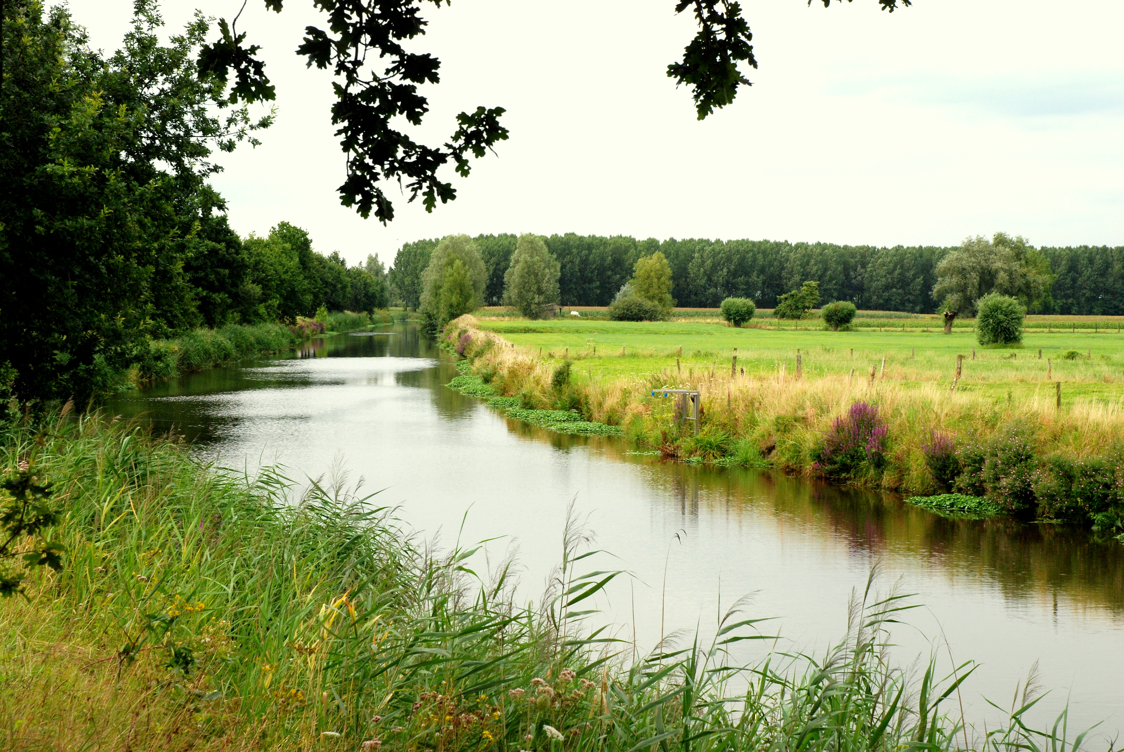 De Kalkenvaart in de Kalkense meersen (Kalken, Oost-Vlaanderen)